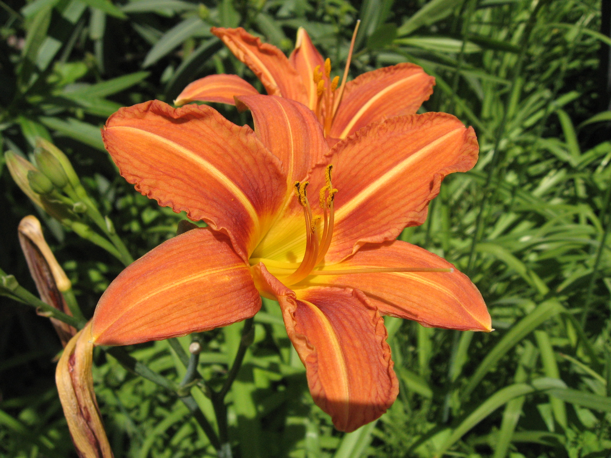 Hemerocallis fulva. Real Jardín Botánico de Madrid.